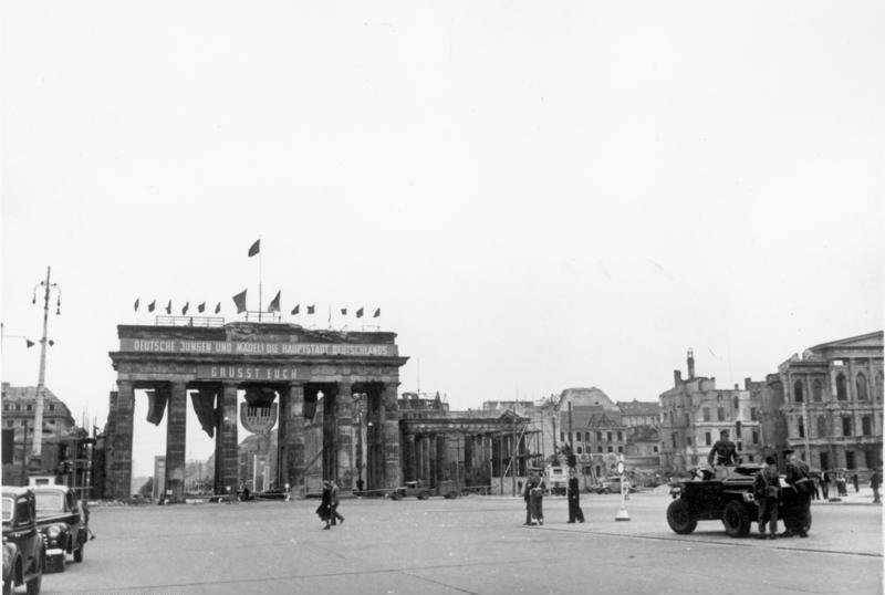 ADN-ZB/ Illus Deutschlandtreffen 1950 - Westberlin. - 1 britischer Panzerwagen vor dem Brandenburger Tor. 1.6.1950 6700-50